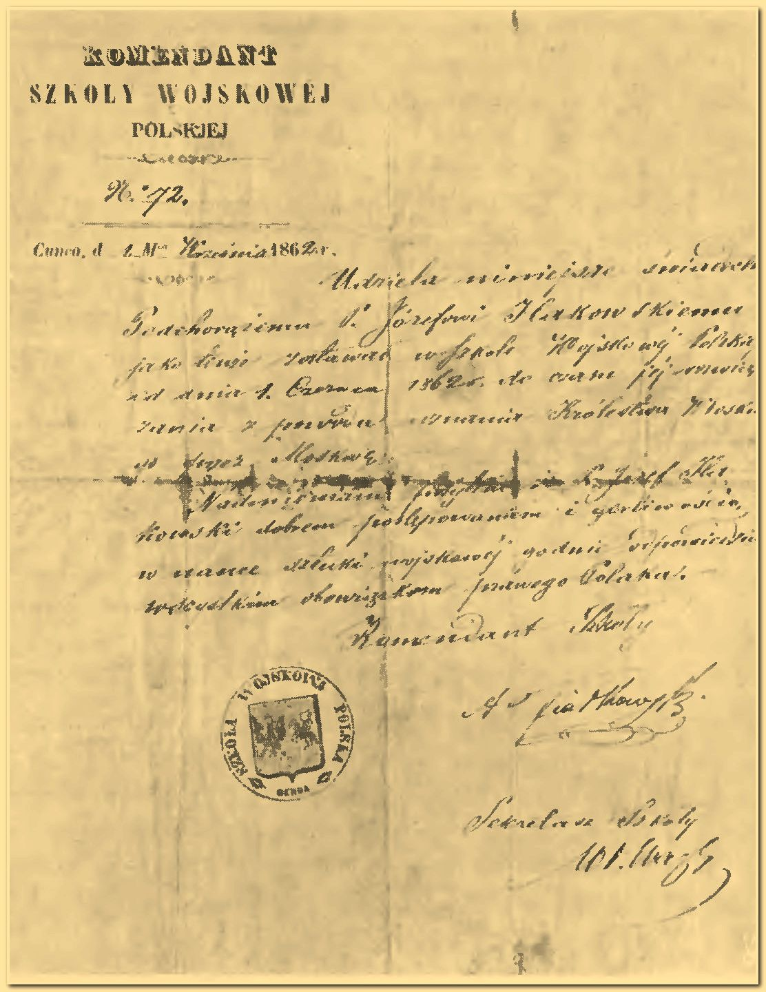 Świadectwo ukończenia Polskiej Szkoły Wojskowej przez Józefa Iłakowskiego.